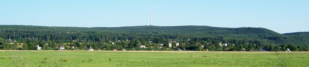 vrch Cukrák, panorama / Cukrák Hill, panoramatic photo